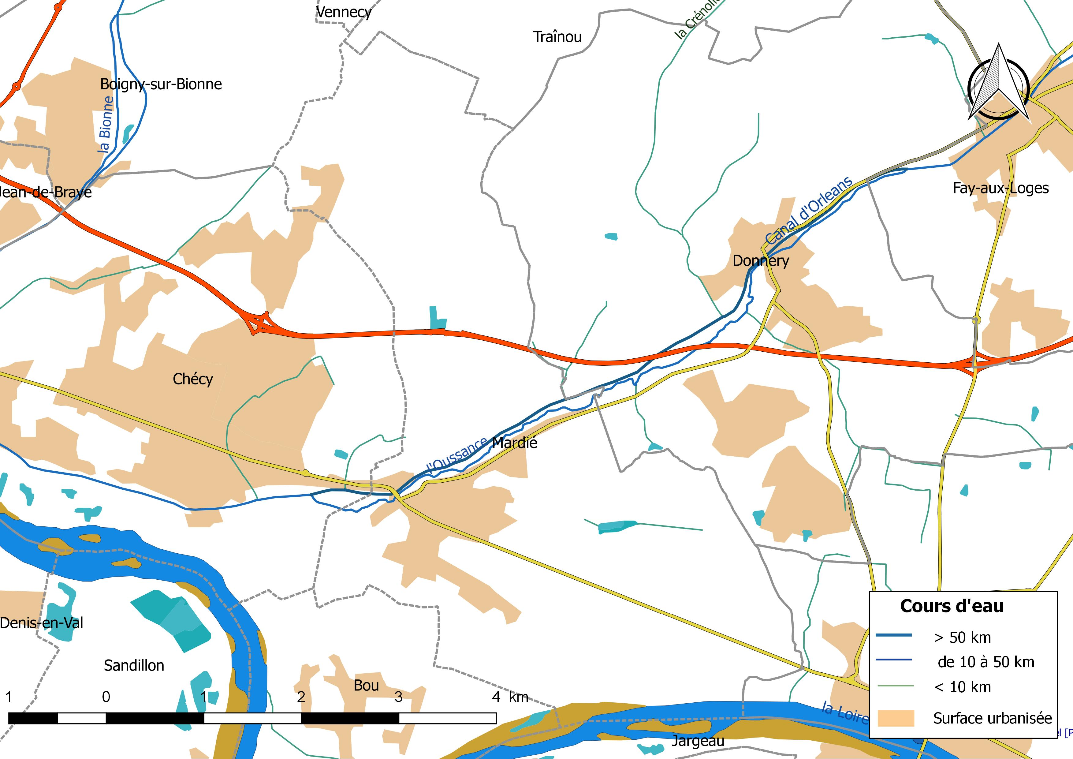 Carte du réseau hydrographique de la commune de Mardié (France).